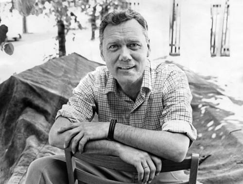 Foto på Olof Thunberg, publicerat i Röster i Radio-TV 1968:28, sid 3.